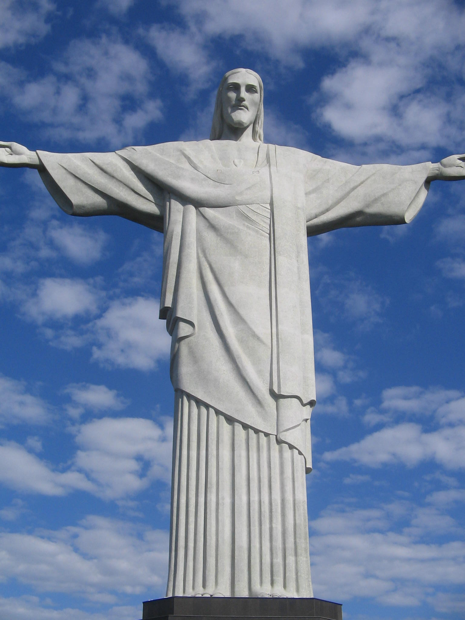 Linda imagem se formou no céu atrás do Cristo Redentor, salpicado de nuvenzinhas brancas, um presente!